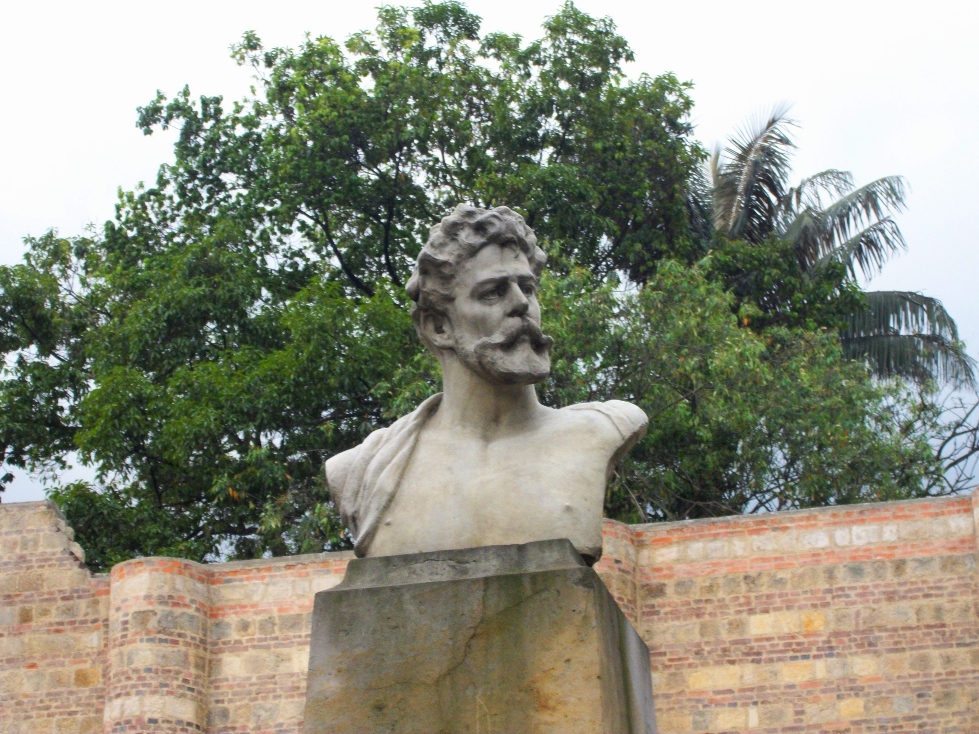 Busto de Epifani Garay en Bogotá, cra 7 con clle 28, enfrente del Mueso Nacional.